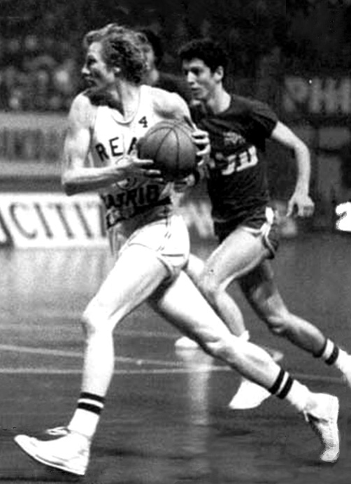 Wayne Brabender, jugador del Real Madrid de Baloncesto entre los años 1967 y 1983.